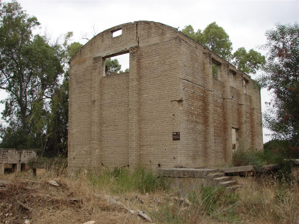 תחנת הרכבת בית נבאללה - הבניין המערבי